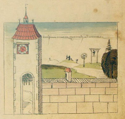 Blick auf den Galgenberg vor dem Oberen Tor. Volkacher Salbuch folio 394r